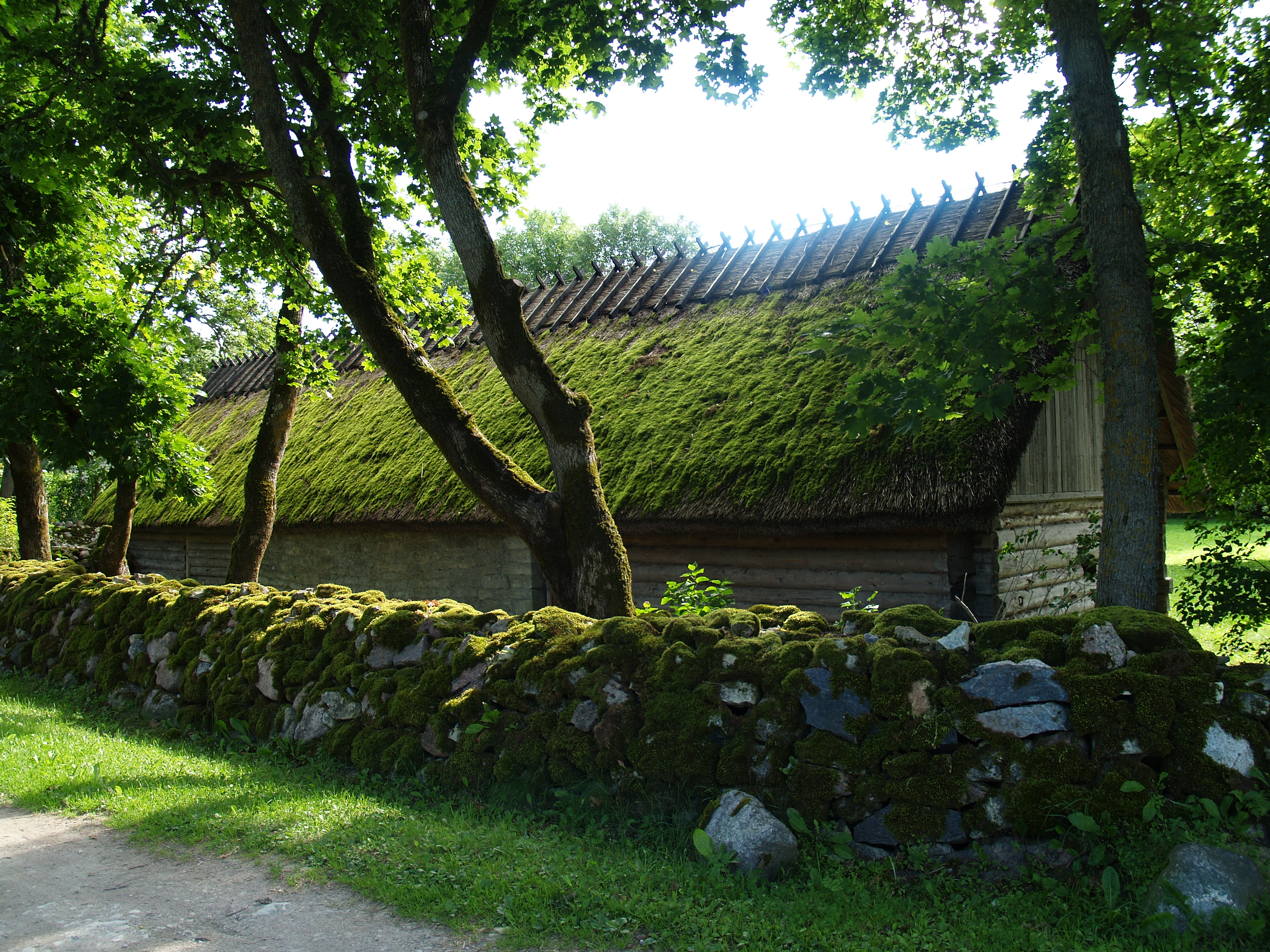 Koguva küla Hansu talu mõrrakuur